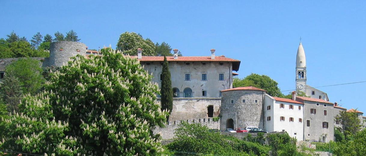 Štanjel, village in Slovenia (Kras) photo:Ziga 12:16, 30 August 2006 (UTC)